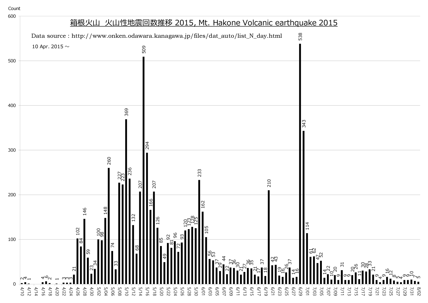 箱根山、火山性地震回数推移 2015、出典：神奈川県温泉地学研究所